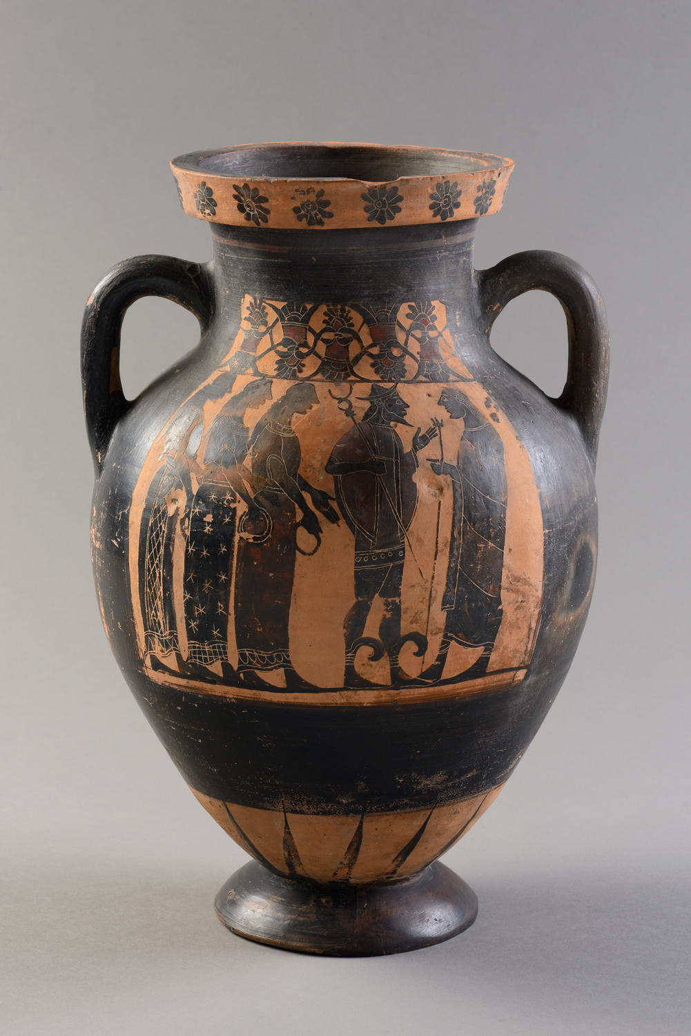 Face A d'une amphore attique à figures noires représentant le jugement de Pâris.